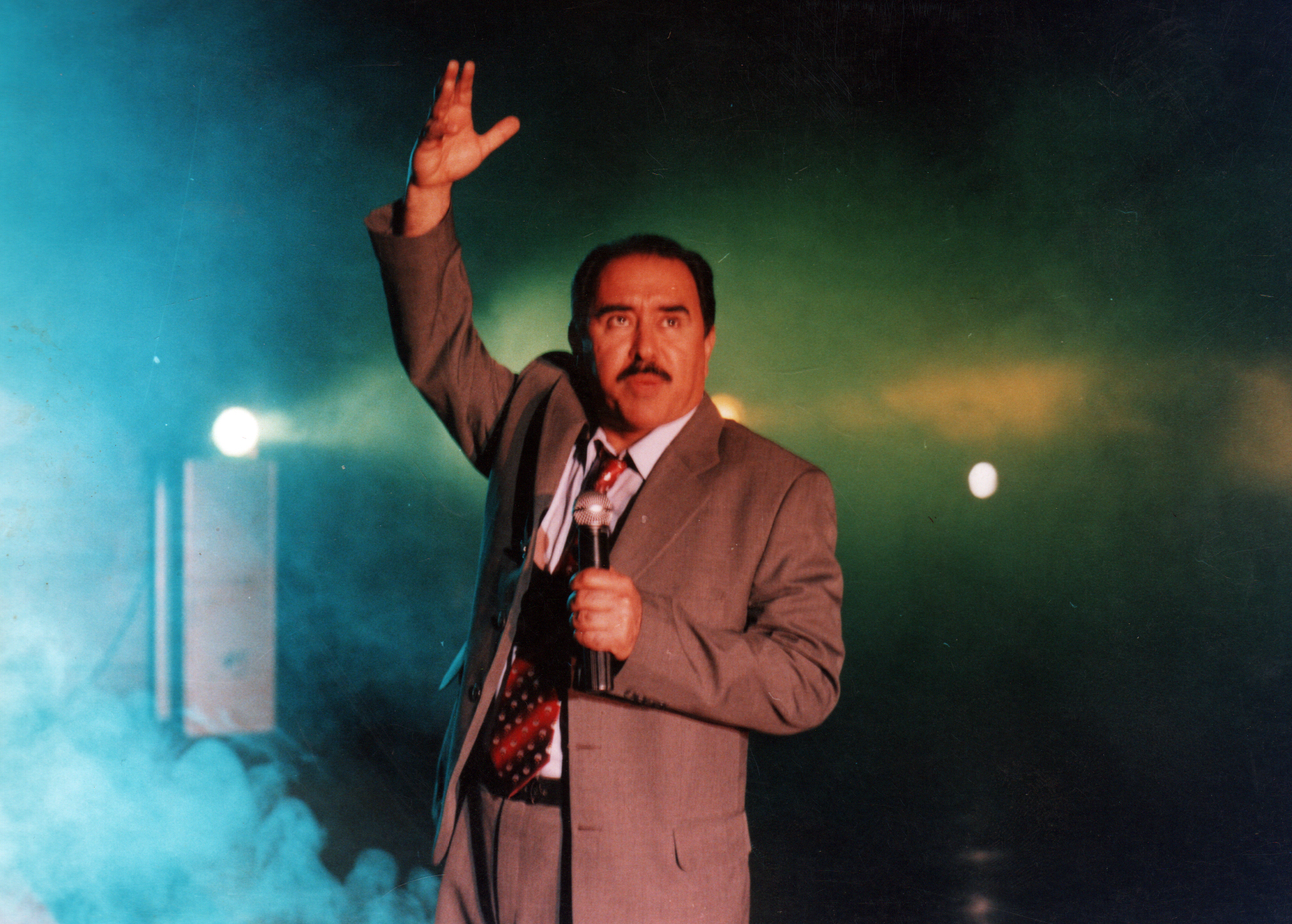 مسرح وطني